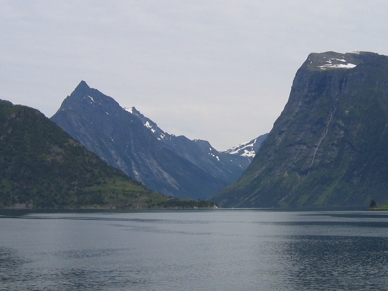 Slogen seen from Hjørundfjorden